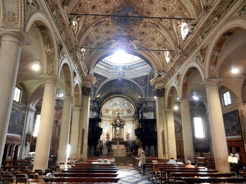 Varese - Interno della Basilica di S. Vittore